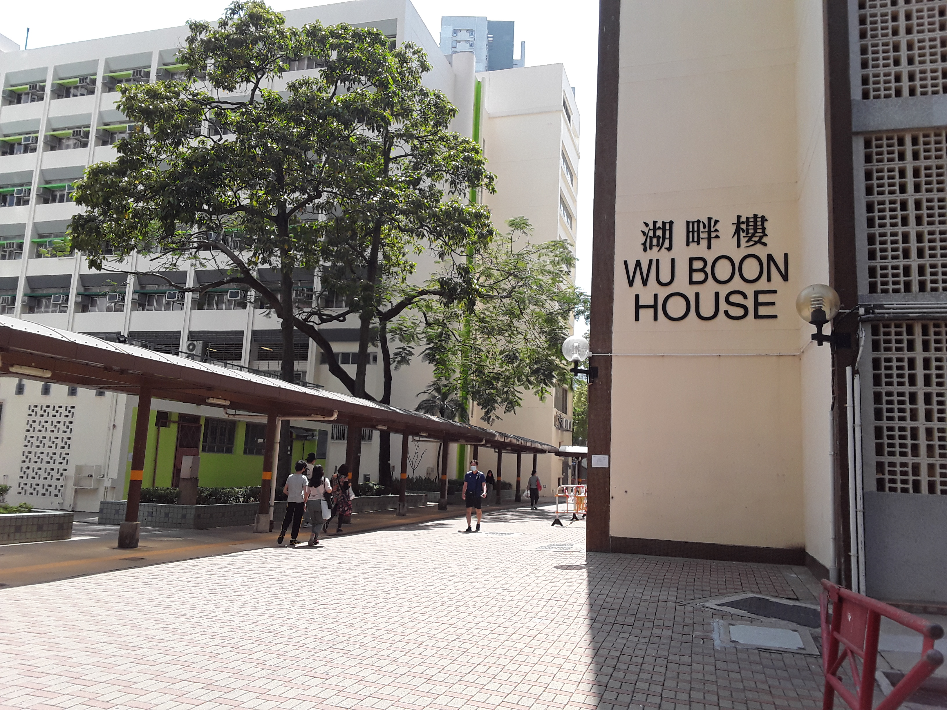 湖景邨湖畔樓與道教青松小學 (湖景邨)